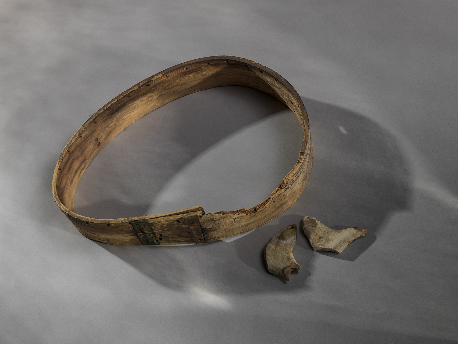 Sørsamisk rammetromme, gievrie, funnet i 1993 ved Røyrtjønna i Nærøy kommune i Trøndelag. Trommeskinnet er ikke bevart, men rammen har små hull som skinnet var festet i. Rammen har to hull for feste av handtaket. Seks hull har vært brukt til snorer til å henge gjenstander i når tromma var i bruk. På den eggformete rammen er symboler innrisset, bl.a. linjer, teltlignende figurer og rutemønster. Rammen er 24 x 33 cm stor. Sammen med tromma lå biter av gevir, trolig rester av en hammer eller viser. T21692. Foto: Åge Hojem/NTNU Vitenskapsmuseet Tekst: Birgitta Berglund/NTNU Vitenskapsmuseet